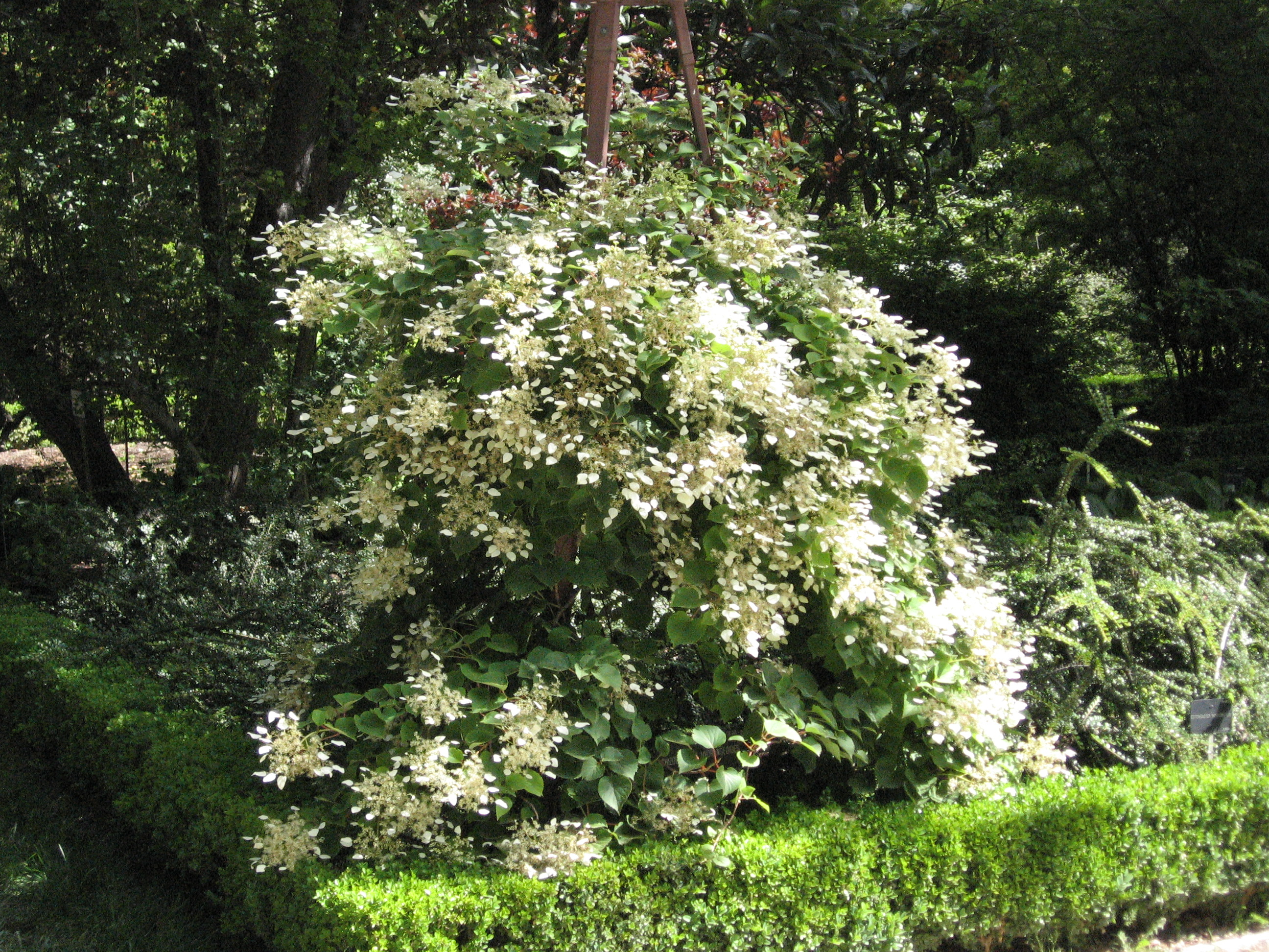 Schizophragma hydrangeoides. Real Jardín Botánico, Madrid.